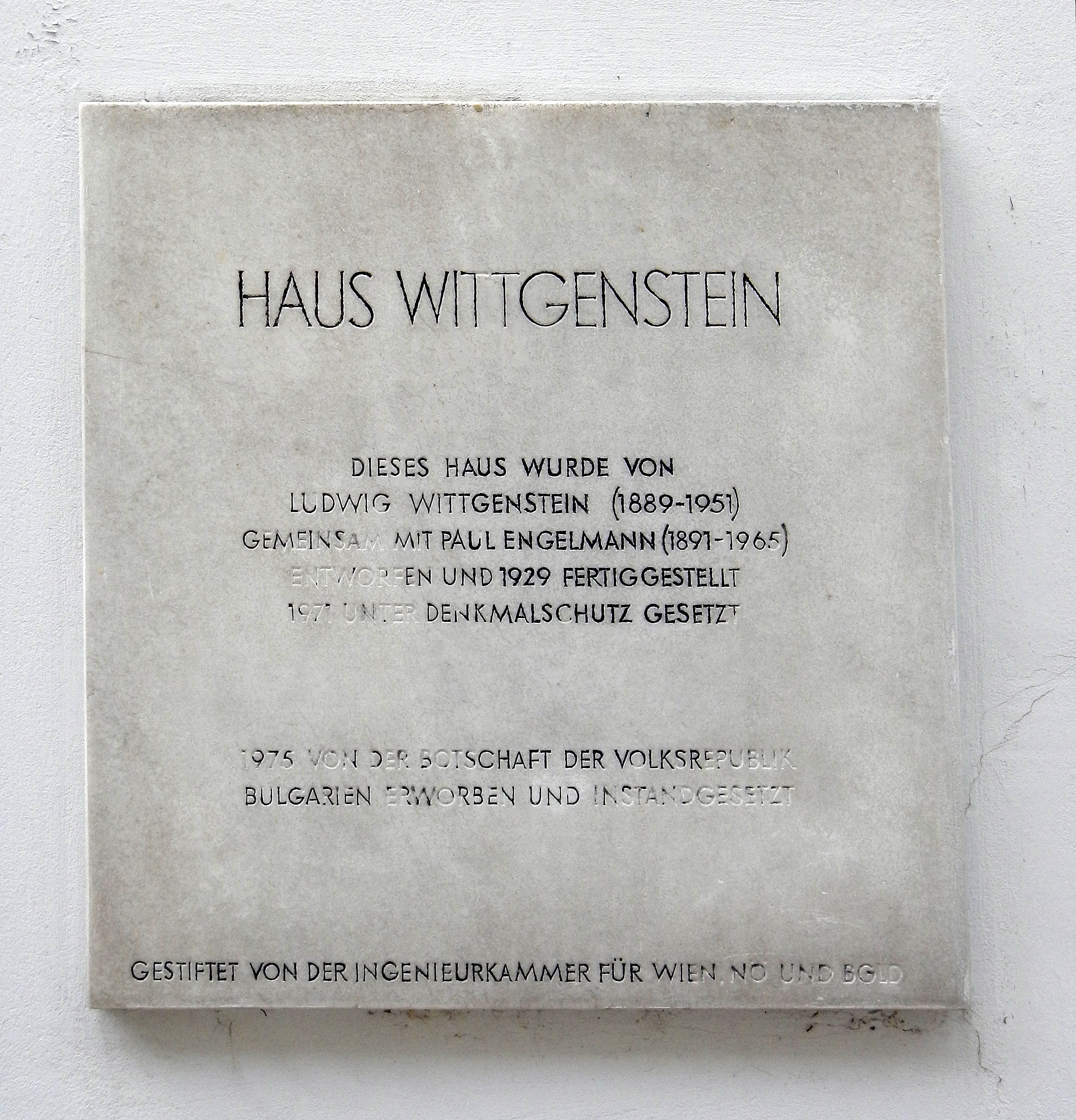 Beschreibung des Wittgensteinhauses, Zustand 2015